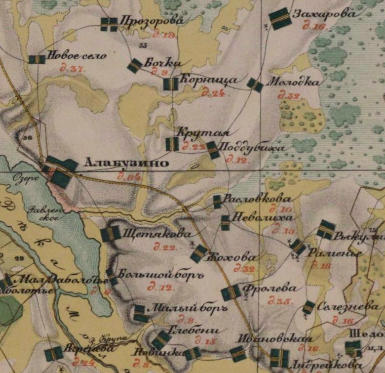 Топографическая межевая карта Тверской губернии [Карты]